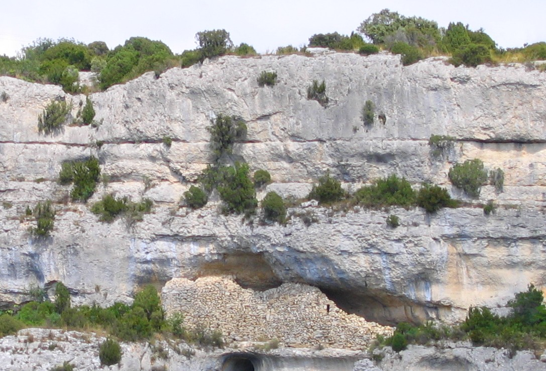 Abri sous roche, Gorges du Brian, Minerve, Hérault, France